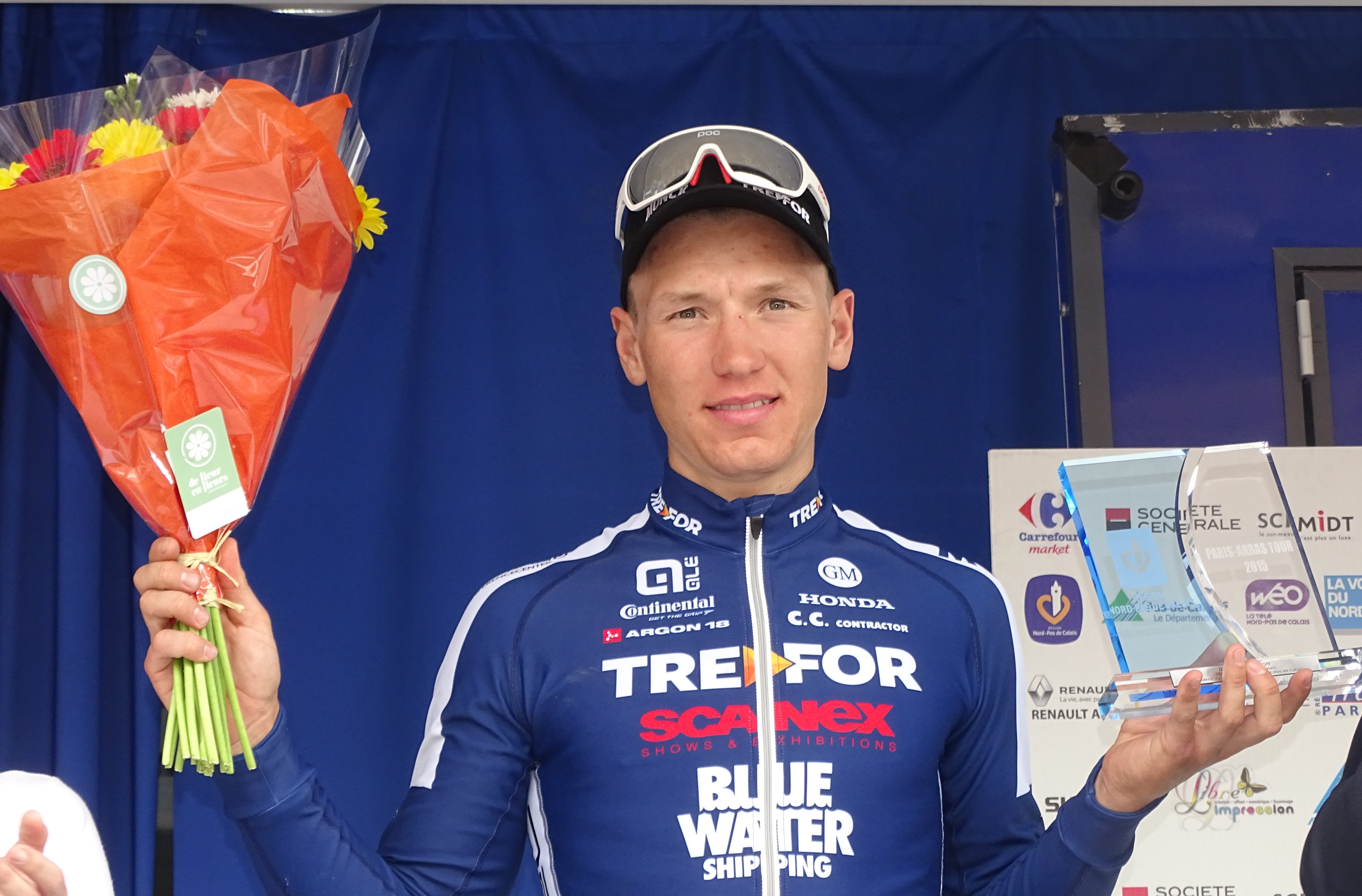 Reportage réalisé le dimanche 24 mai 2015 à l'occasion du départ et de l'arrivée de la troisième étape du Paris-Arras Tour 2015 à Arras, Pas-de-Calais, Nord-Pas-de-Calais, France. Depicted person: Asbjørn Kragh Andersen Depicted team: Trefor-Blue Water